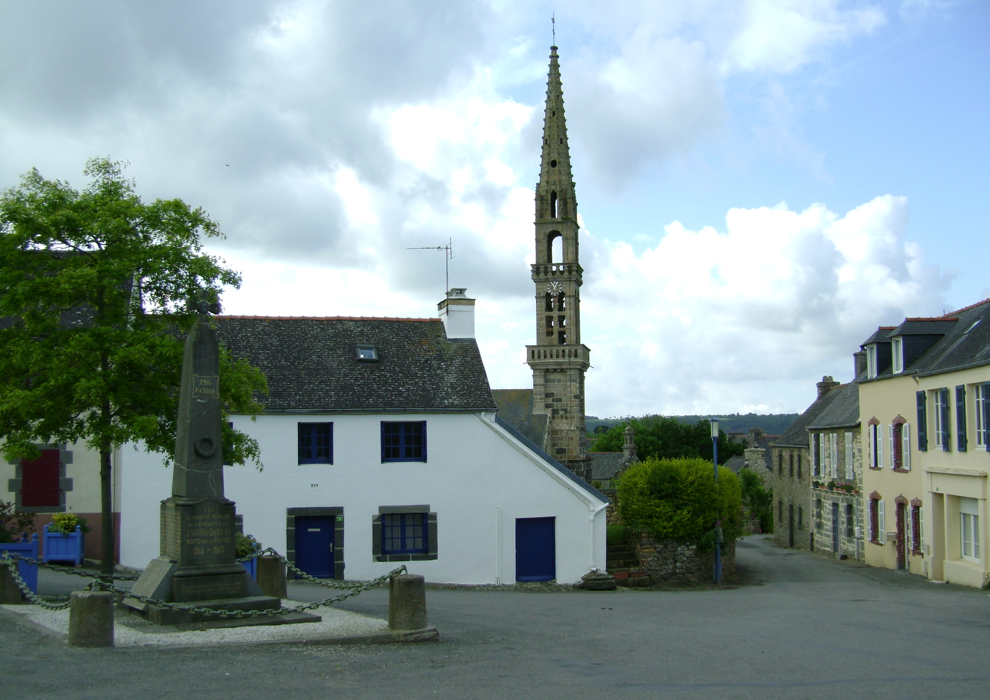 Logonna-Daoulas, la place Saint-Monna.JPG